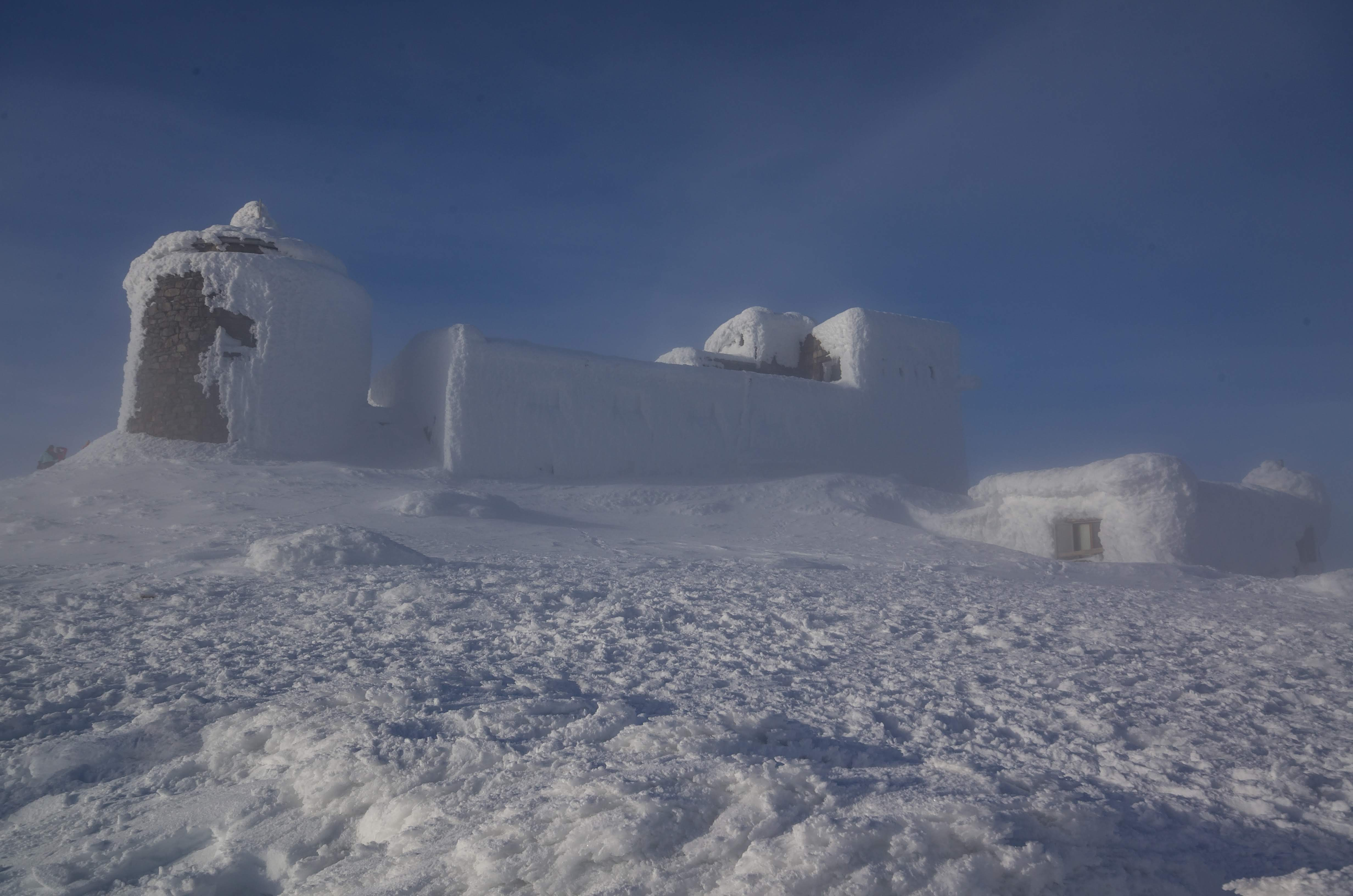 "Білий Слон". Кубок Білого Слона 2018